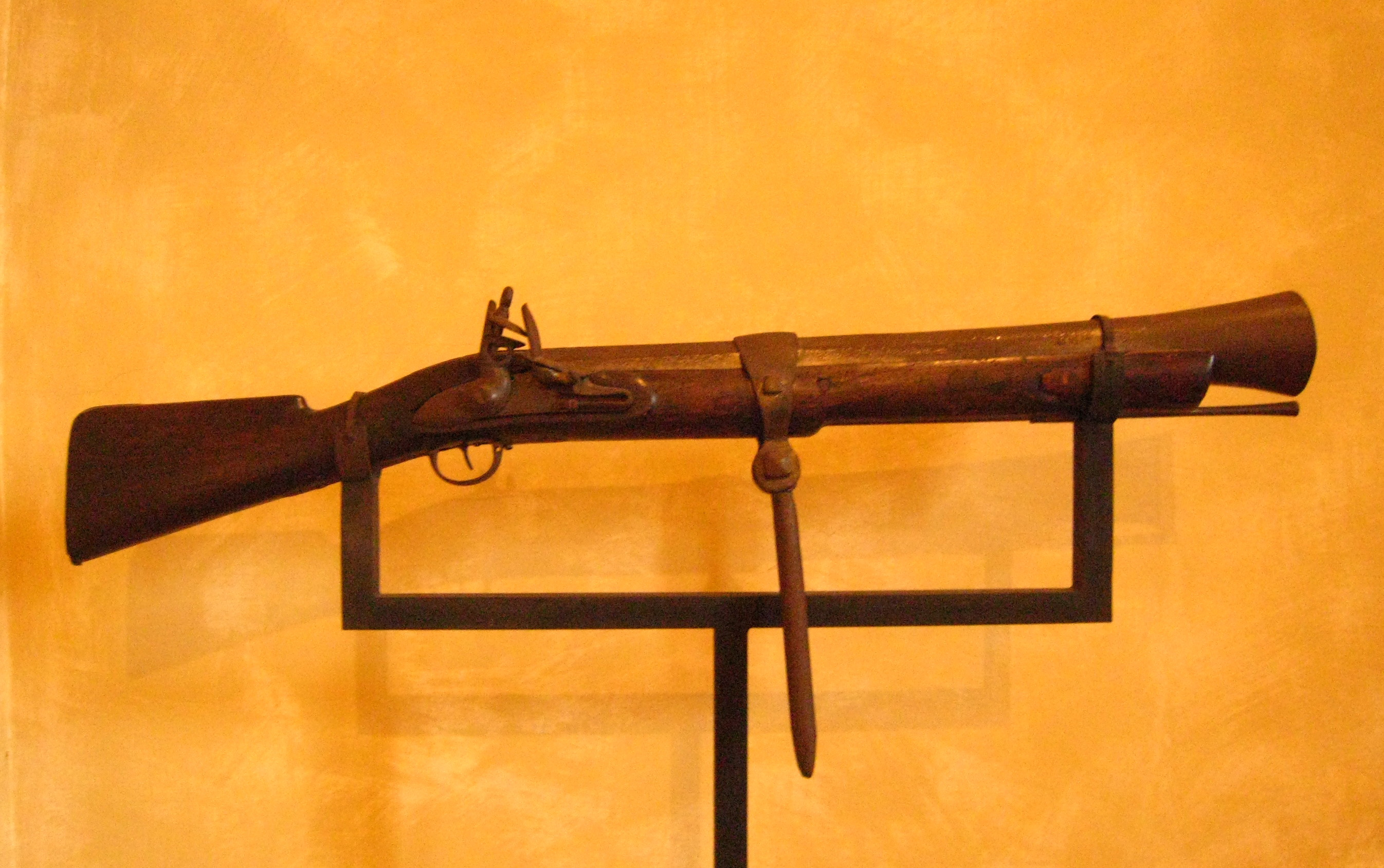 Spingarda conservata al castello di San Giusto - Trieste